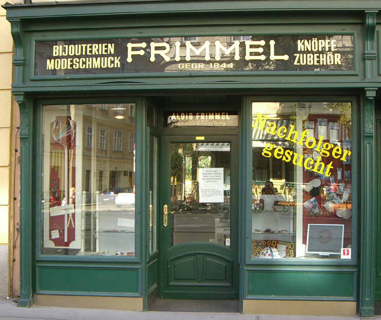 Geschäft des 'Knopfkönigs' Wiedner Hauptstrasse 38, 1040 Wien